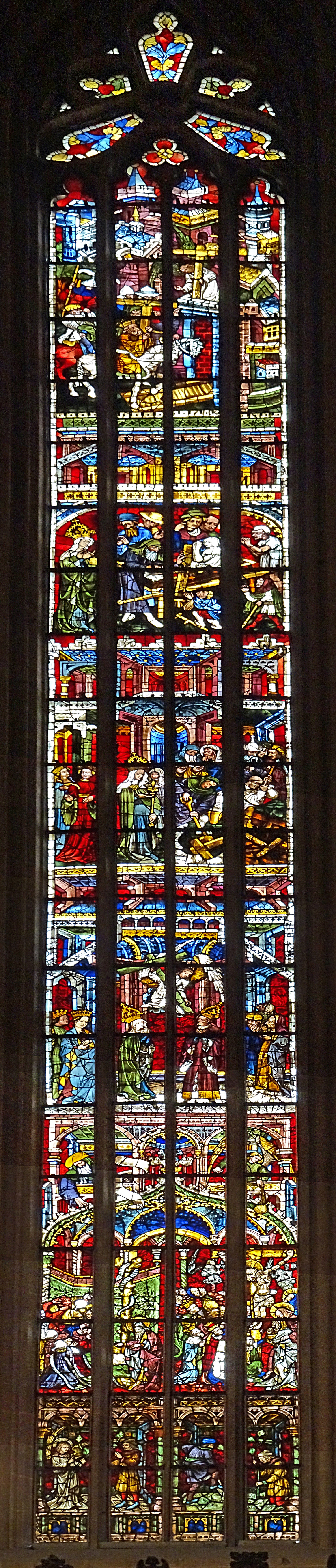 Helenafenster (nVIII) im Hohen Chor des Erfurter Doms St. Marien